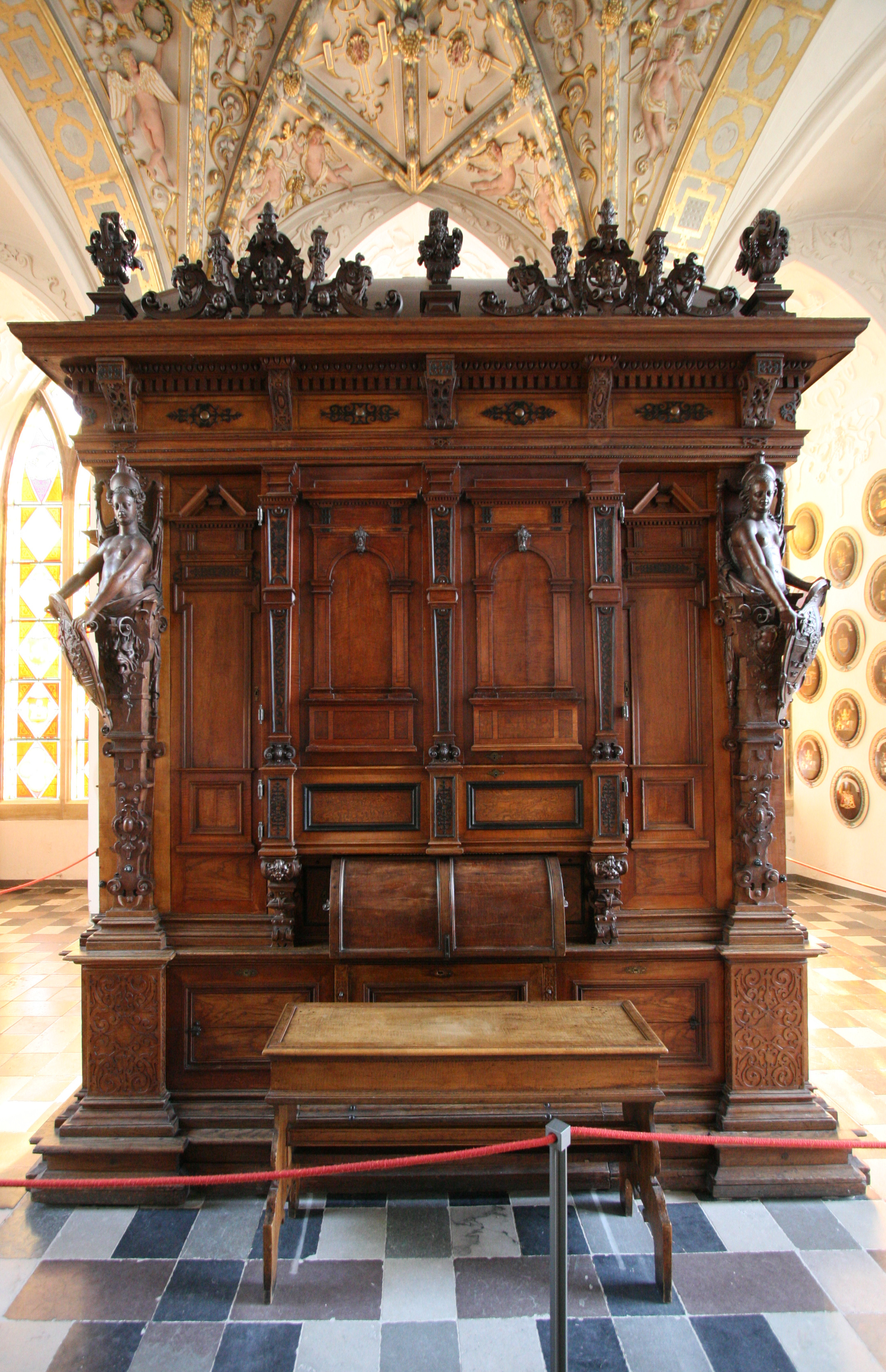 Frederiksborg Slotkirke, Hillerød, Denmark. Compenius organ